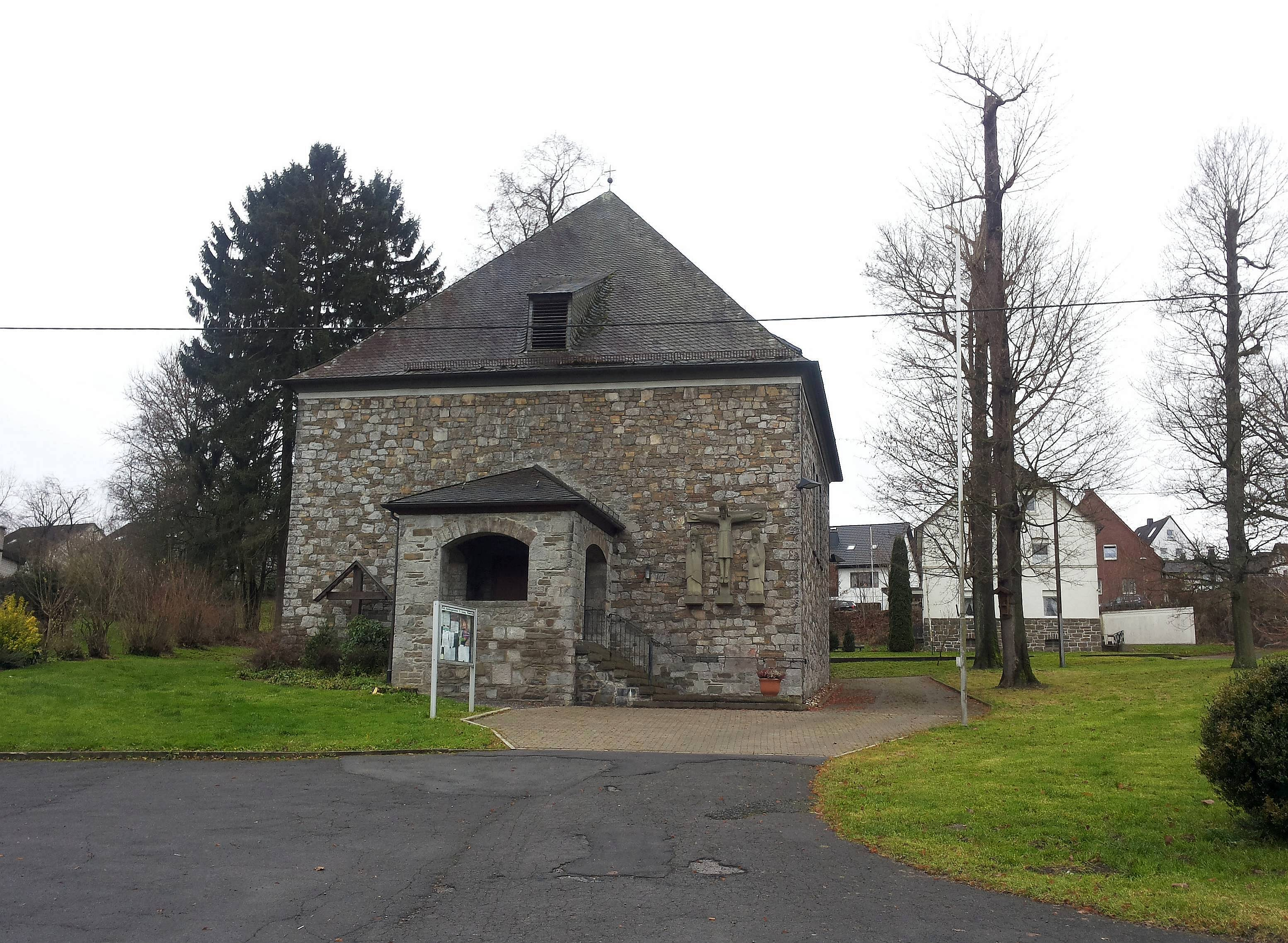 denkmalgeschützte St. Georg-Kirche in Küntrop (Neuenrade), Germany